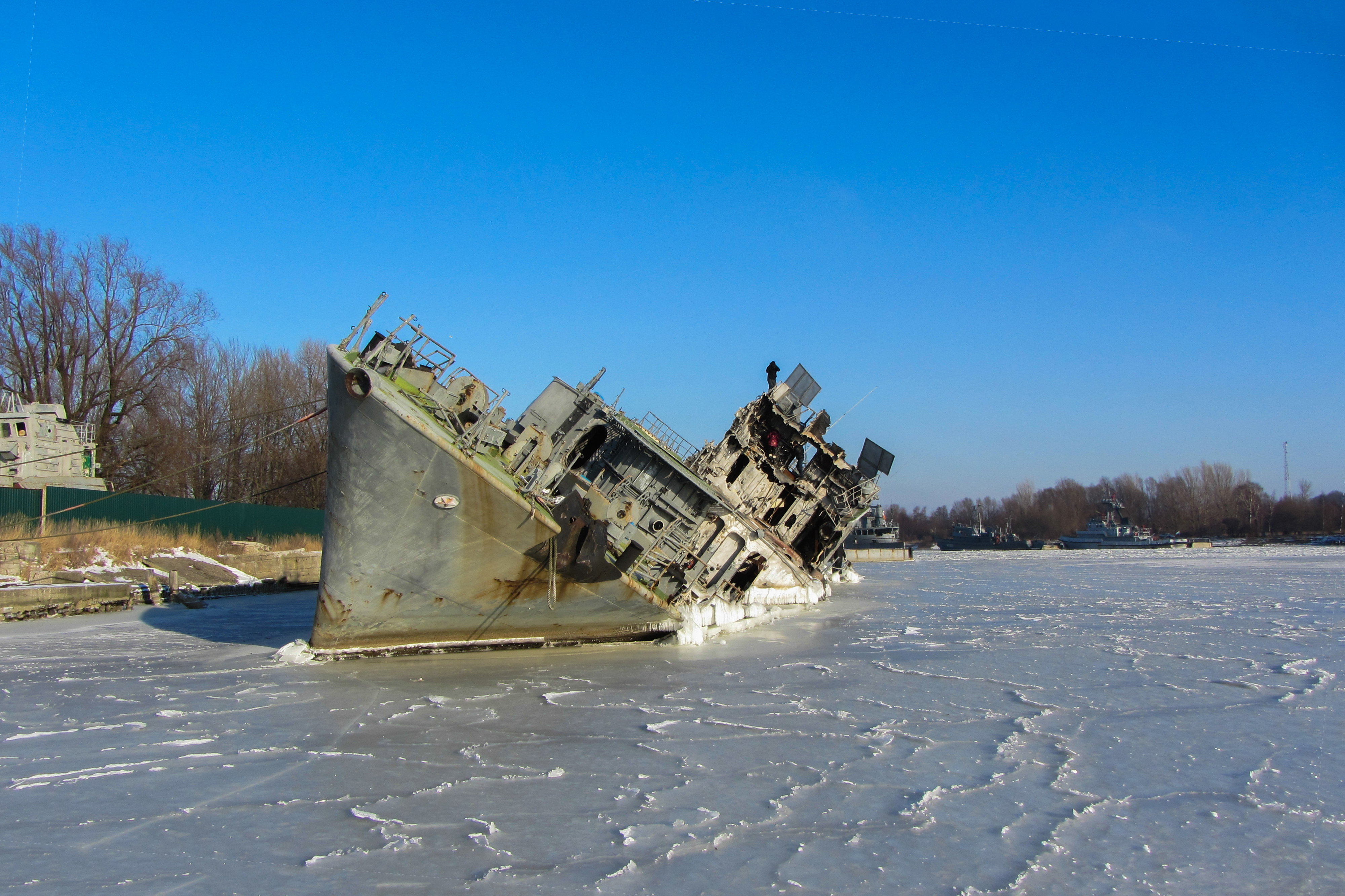 МПК-228 Башкортостан после пожара в гавани Балтийска